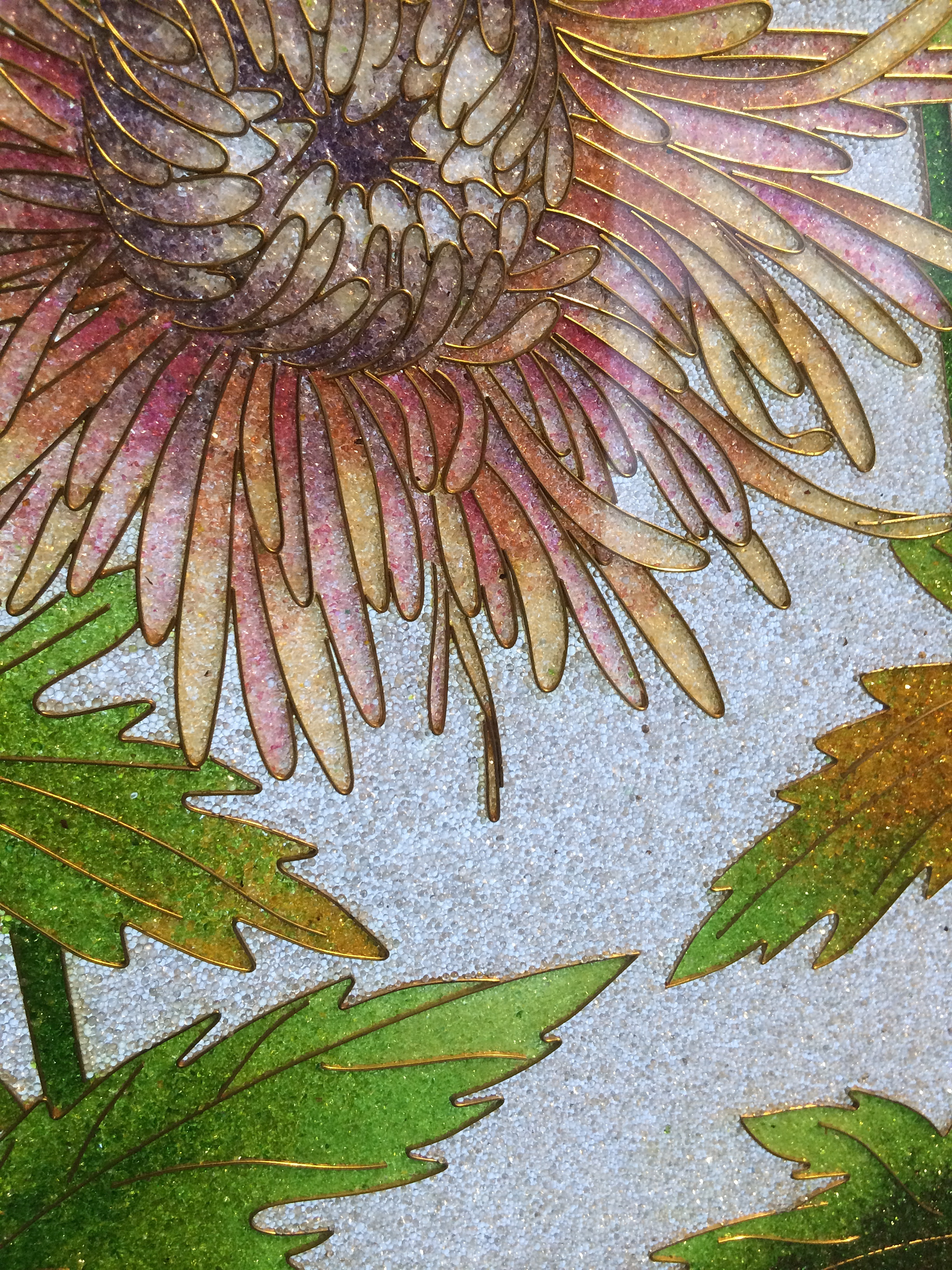 Vitrall cloisonné (detall), panell de doble porta obra de Frederic Vidal i Puig (1882-1950) per a la casa Bertrans i Serra de Barcelona, actualment al MNAC